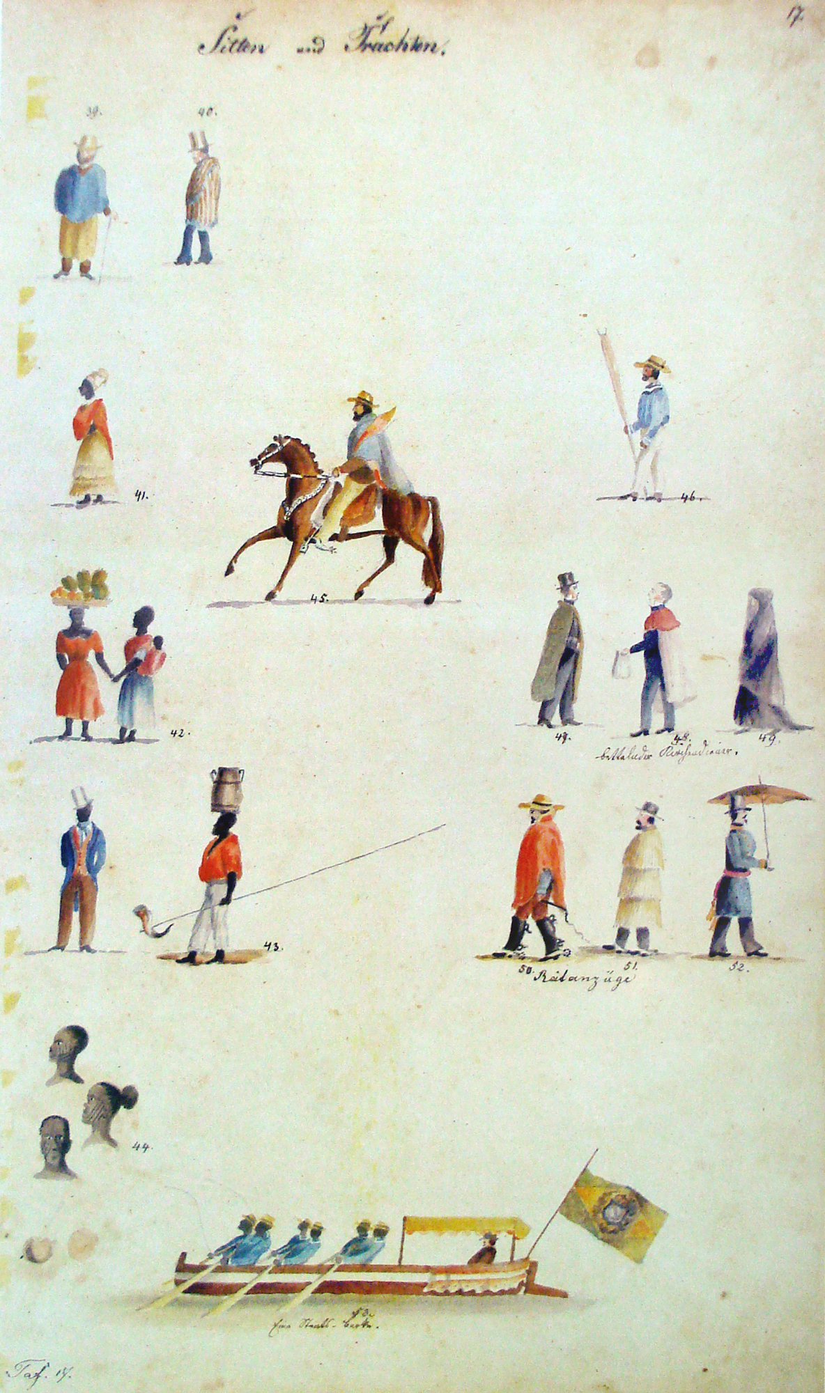 Herrmann Wendroth: Tipos humanos típicos da Província de São Pedro, 1852. Aquarela.